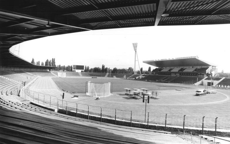 Berlin, Friedrich-Ludwig-Jahn-Sportpark ADN-ZB Mittelstädt 2.7.87 Berlin: Premiere im neuen Jahn-Sportpark-Mit den Olympischen Tag der Leichtathleten am 8.7.87 wird er traditionsreiche Friedrich-Ludwig-Jahn-Sportpark an der Cantianstraße nach knapp einjähriger Rekonstruktionszeit in neuem Gewand wiedereröffnet. Eine 60 m lange Haupttribüne wurde errichtet (im Hintergrund) und auch auf der Gegenseite erstreckt sich ein Dach von 216 m Länge, so daß nunmehr 10 182 Plätze überdacht sind. Vier Flutlichtmasten mit insgesamt 240 Scheinwerfern bieten auch bei Dunkelheit für Athleten und rund 20.000 Zuschauer gute Bedingungen.